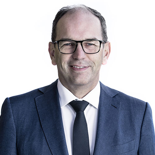 Offizielles Porträt von Kantonsrat und Regierungsratskandidat Bruno Damann (2016)